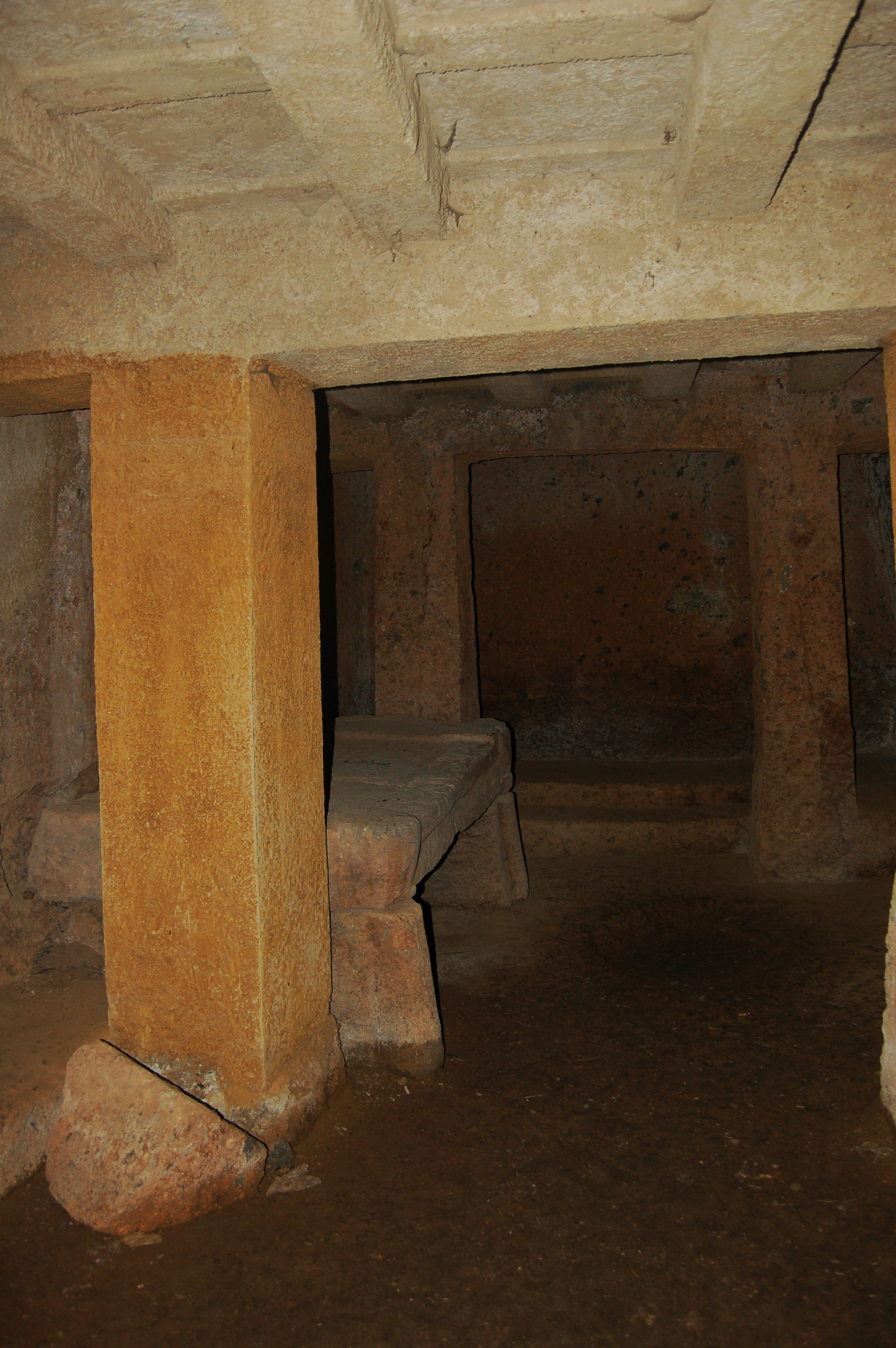 L'interno di una tomba etrusca presso il Parco Regionale Marturanum a Barbarano Romano